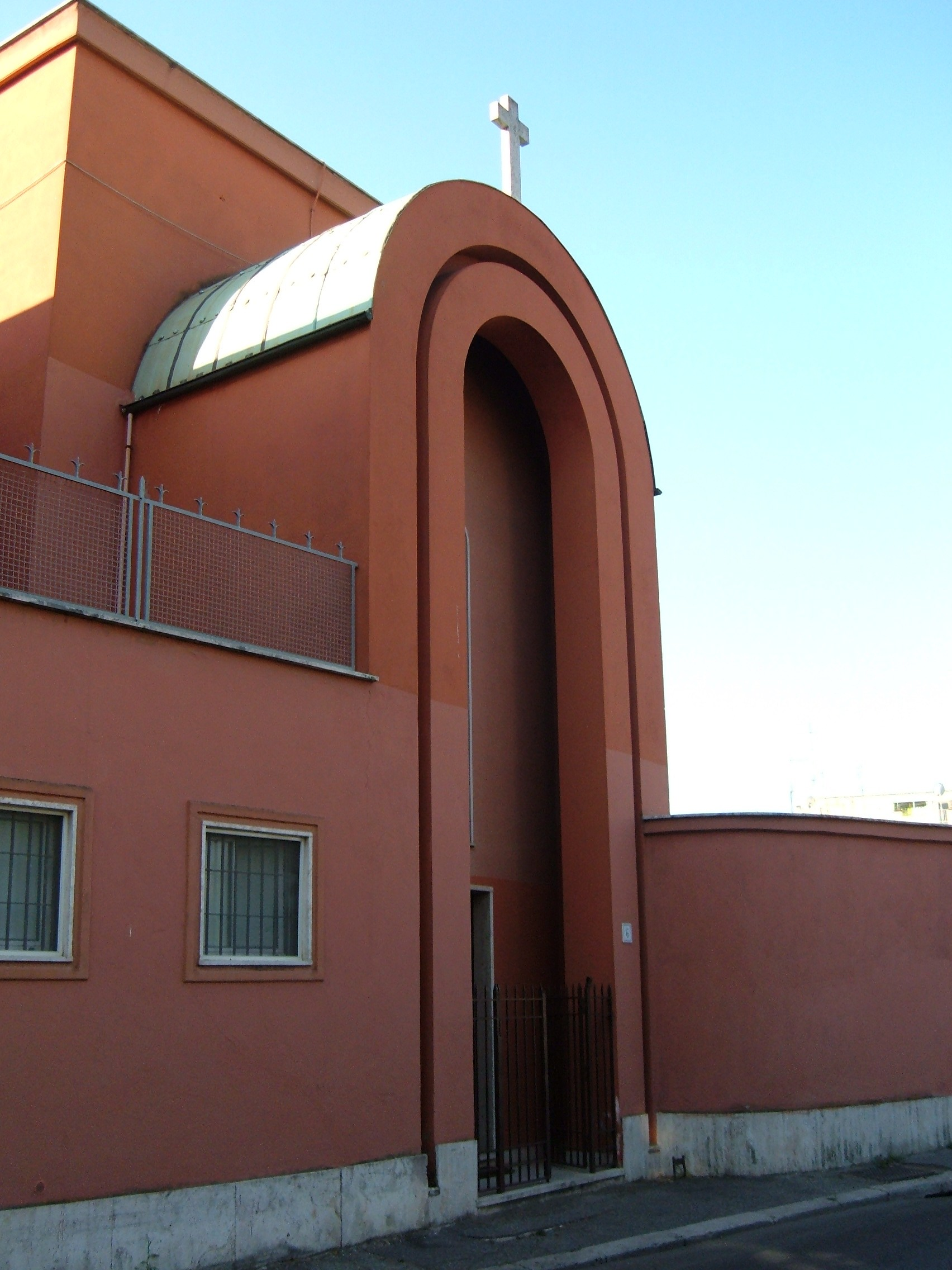 Chiesa del monastero di San Cosimato, a Roma, nel quartiere Ostiense, in via Ambrogio Contarini.